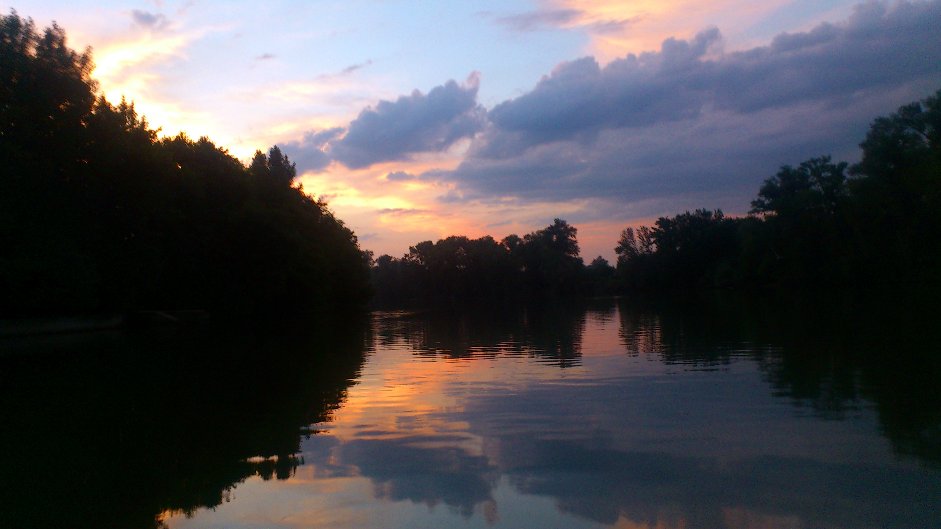 Река Чаган